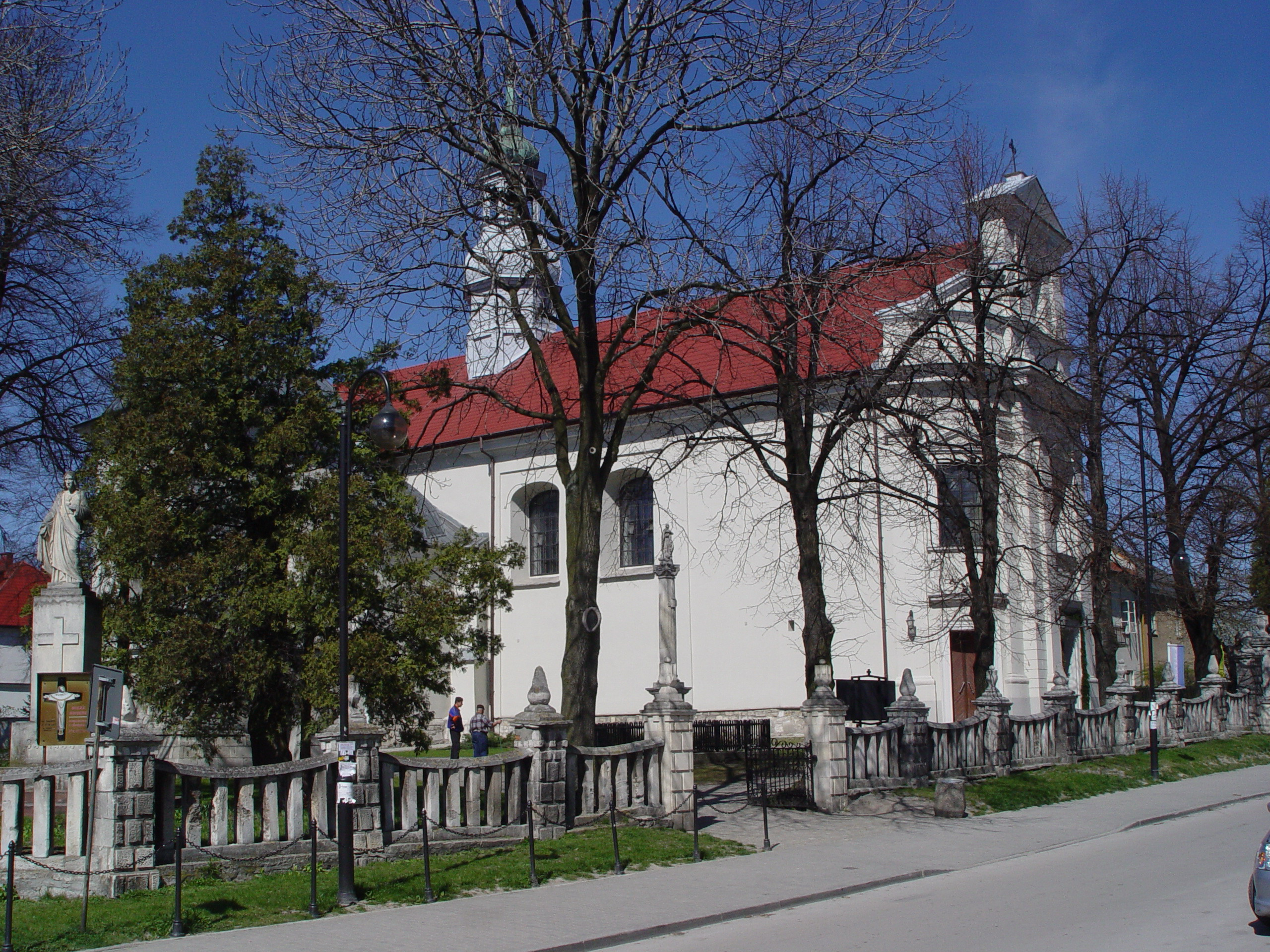 Kościół pw. Niepokalanego Poczęcia Najświętszej Marii Panny w Busku-Zdroju.